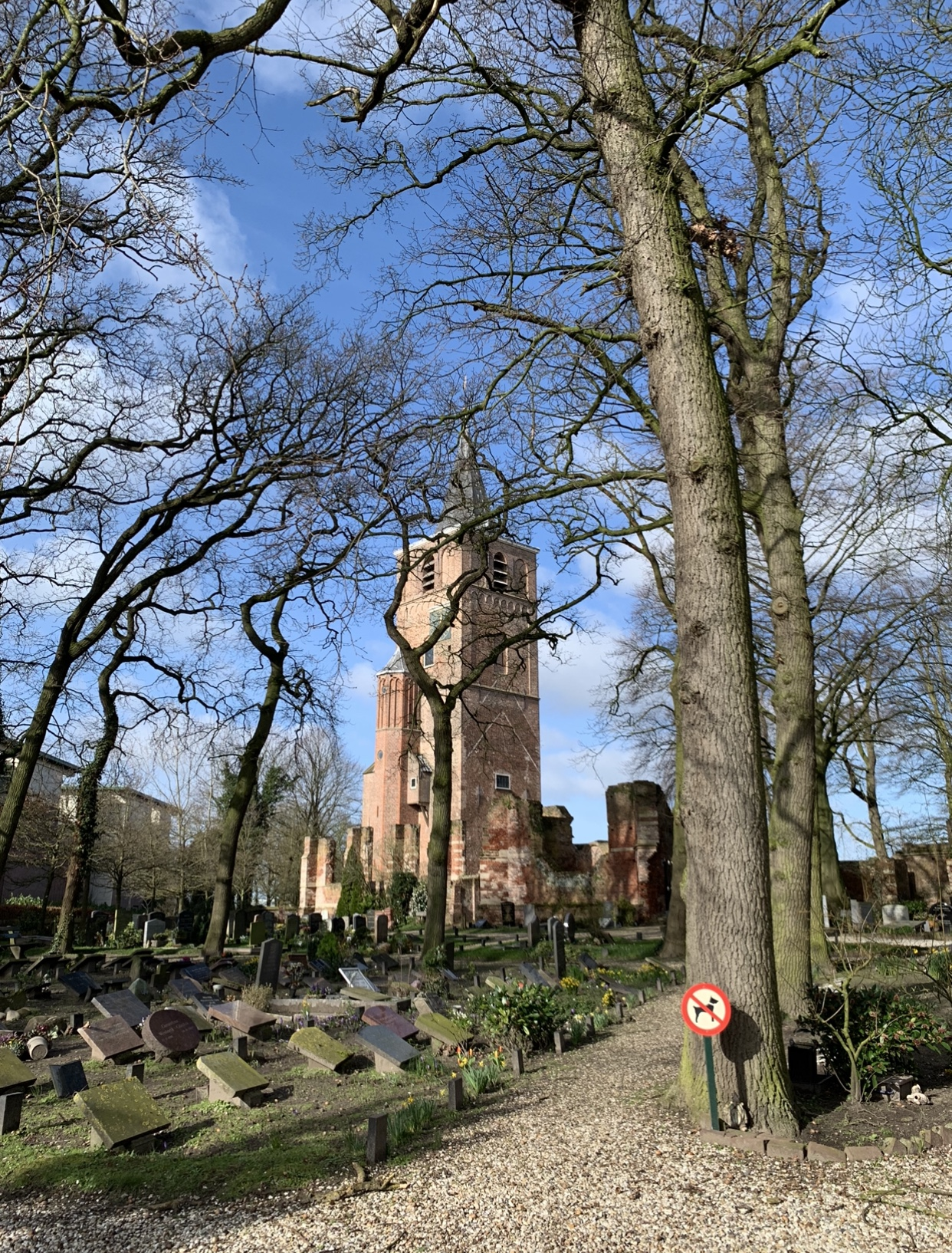 Zicht van de ruïne van de Oude Toren vanuit de ingang van het kerkhof.